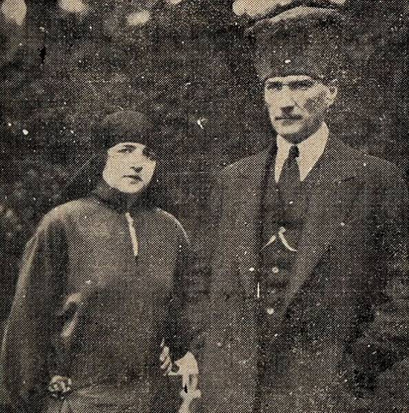 Latife Uşaklıgil ve Atatürk